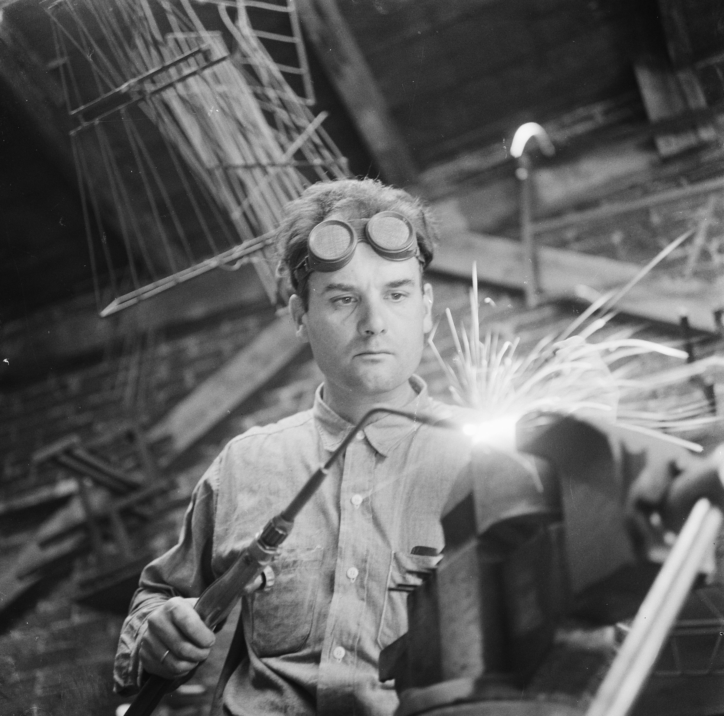 Beeldhouwer Carel Visser aan het werk.